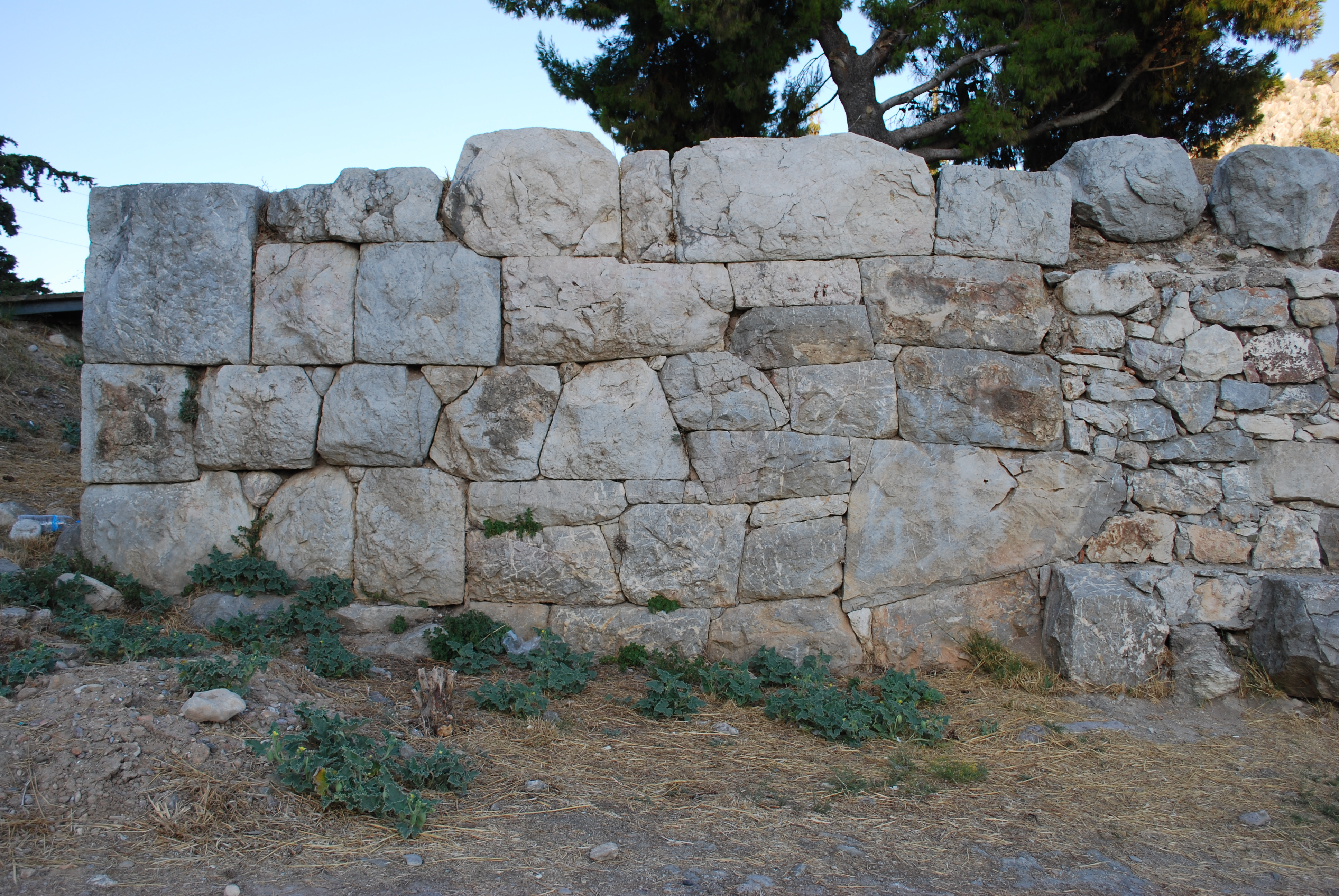 Asiné : l'enceinte mycénienne en appareil polygonal.